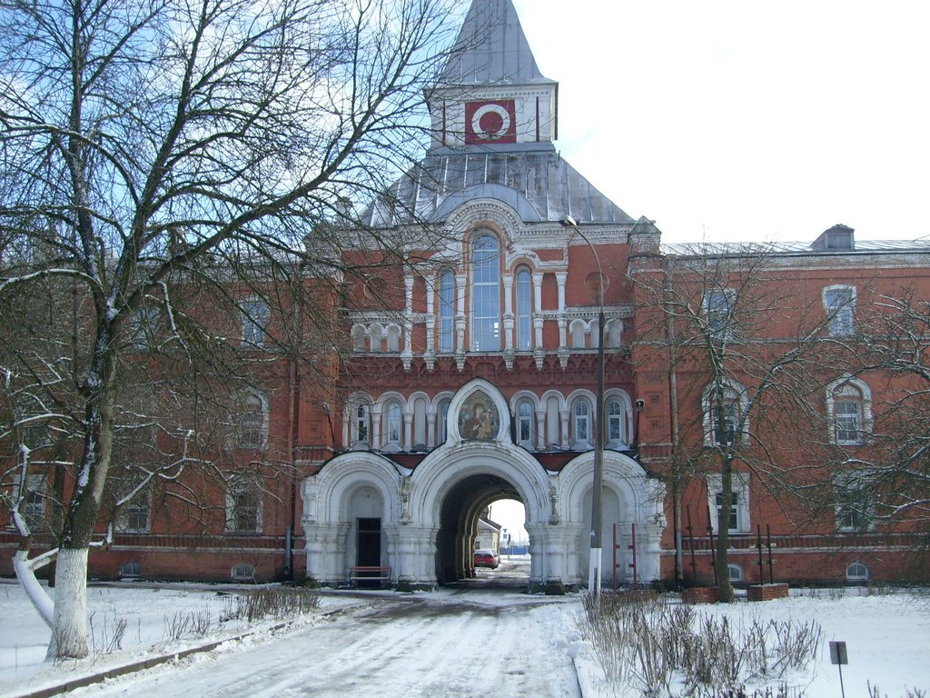 Свято-Троицкая Сергиева Приморская пустынь. Стрельна. Санкт-Петербург.